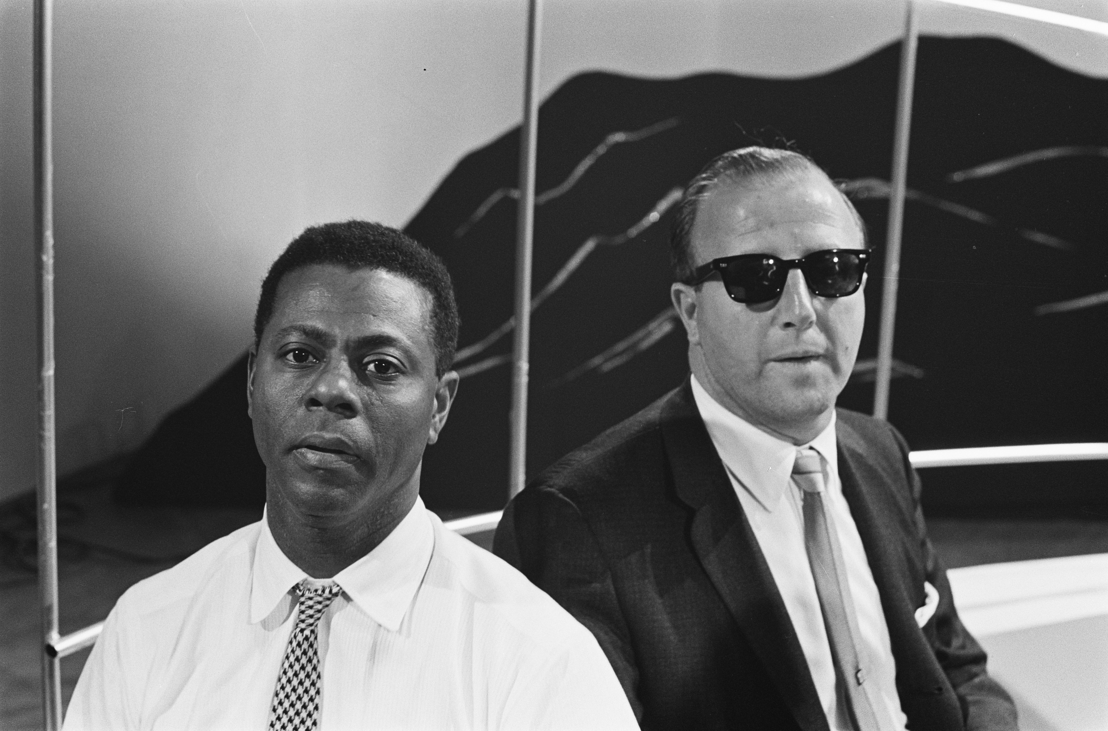 Collectie / Archief : Fotocollectie Anefo Reportage / Serie : [ onbekend ] Beschrijving : George Shearing Quintet in Holland, Hermando Peraza (bongospeler) en George Shearing tijdens de repetitie Datum : 23 september 1962 Trefwoorden : repetities Persoonsnaam : George Shearing, George Shearing Quintet Fotograaf : Gelderen, Hugo van / Anefo Auteursrechthebbende : Nationaal Archief Materiaalsoort : Negatief (zwart/wit) Nummer archiefinventaris : bekijk toegang 2.24.01.05 Bestanddeelnummer : 914-3366